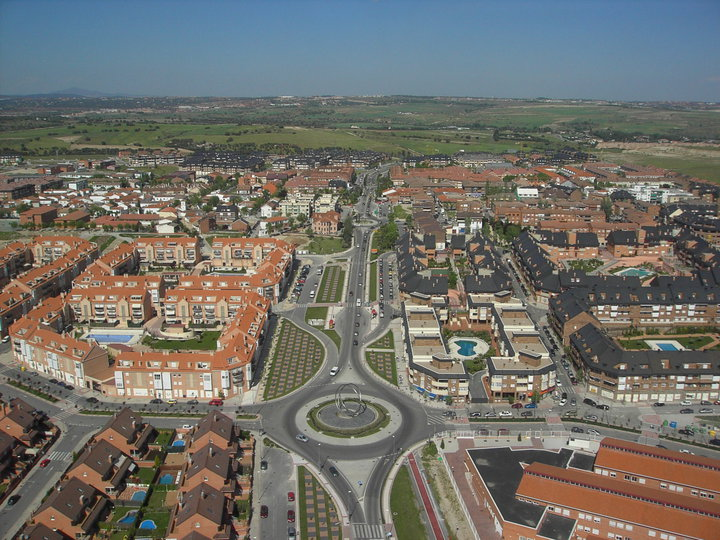 Vista aerea